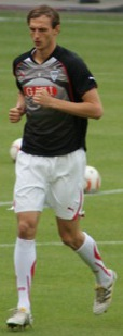 Georg Niedermeier